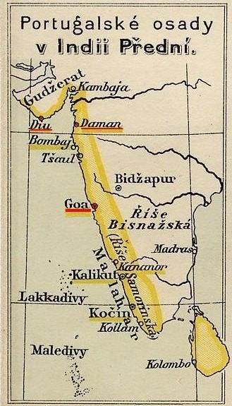 Portugalská Indie „Portugalské osady v Indii přední“ scan z Historicko-zeměpisný atlas školní starého, středního a nového věku, nakl. V. Neubert a synové, Praha (nejp. 1923), mapa II/15 jména autorů map nejsou nikde uvedena, jedná se o dílo ve smyslu $ 59 Autorského zákona scan -jkb